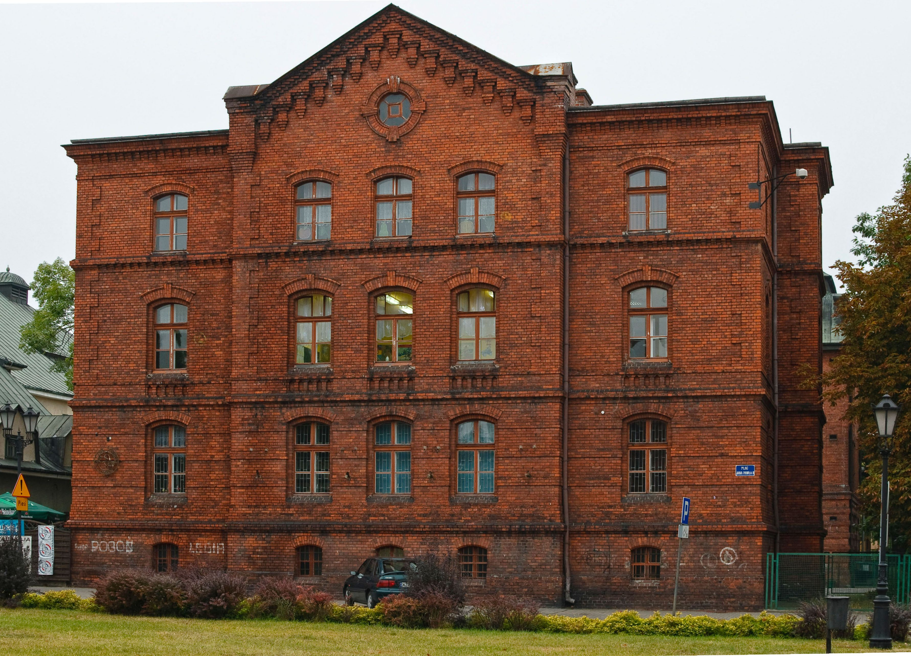 Żyrardów, pl. Jana Pawła II 4 (dawniej pl. Wolności 4) - szkoła (zabytek nr 1108 z 17.05.1975)